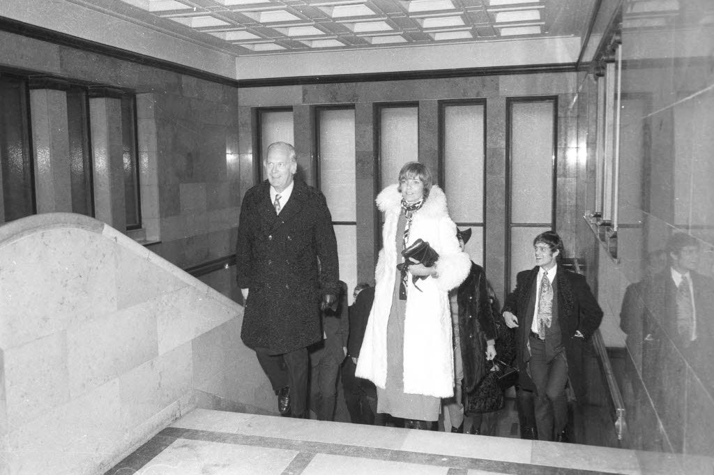 Zu einem Empfang anläßlich der Weltpremiere des Films "Ohrfeigen" von Rolf Thiele im Metro-Kino an der Holtenauer Straße. Vorn Curd Jürgens und Gila von Weitershausen, rechts hinten Werner Pochath auf der Haupttreppe des Rathauses.